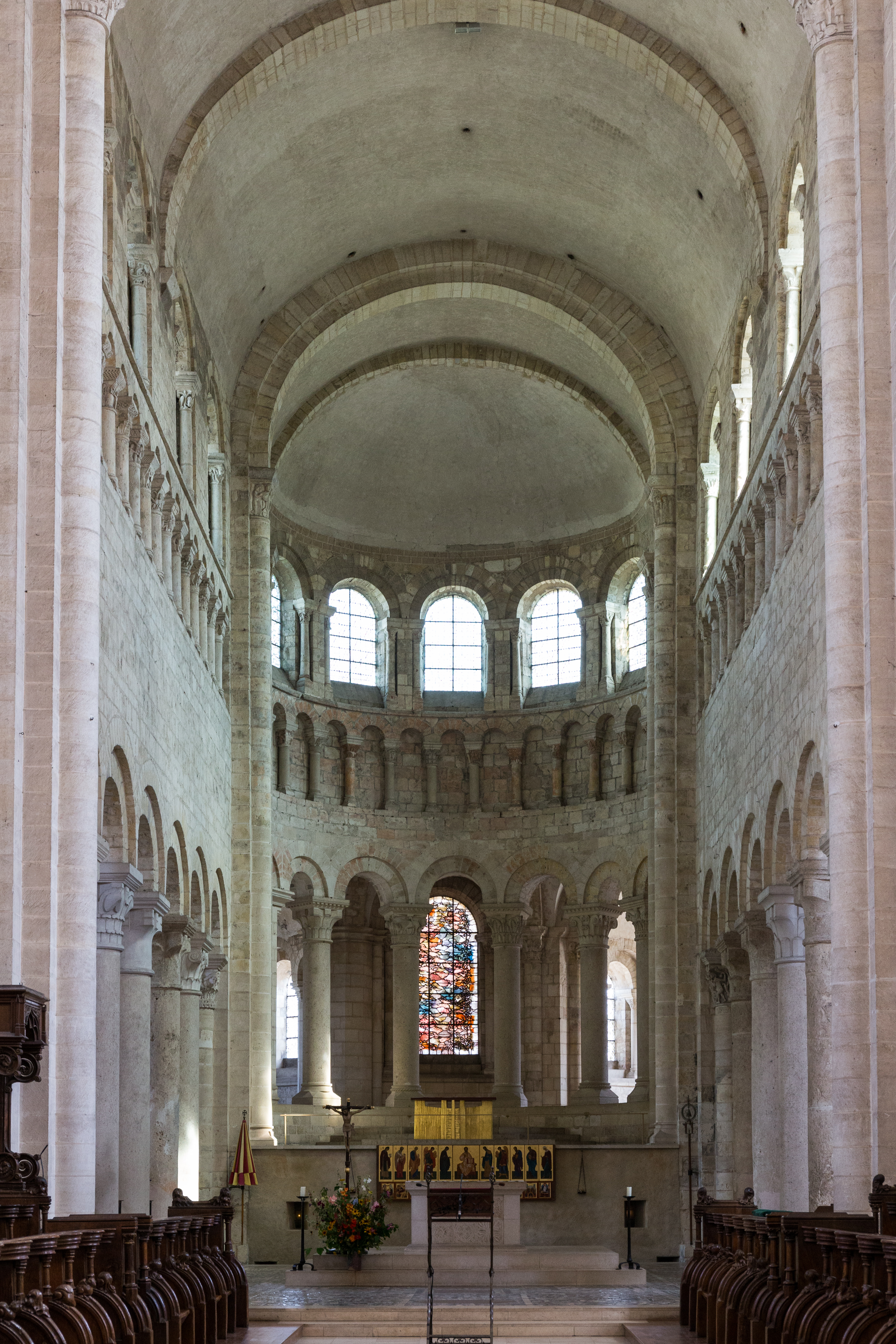 abbatiale Saint-Benoît de Saint-Benoît-sur-Loire : le chœur. .